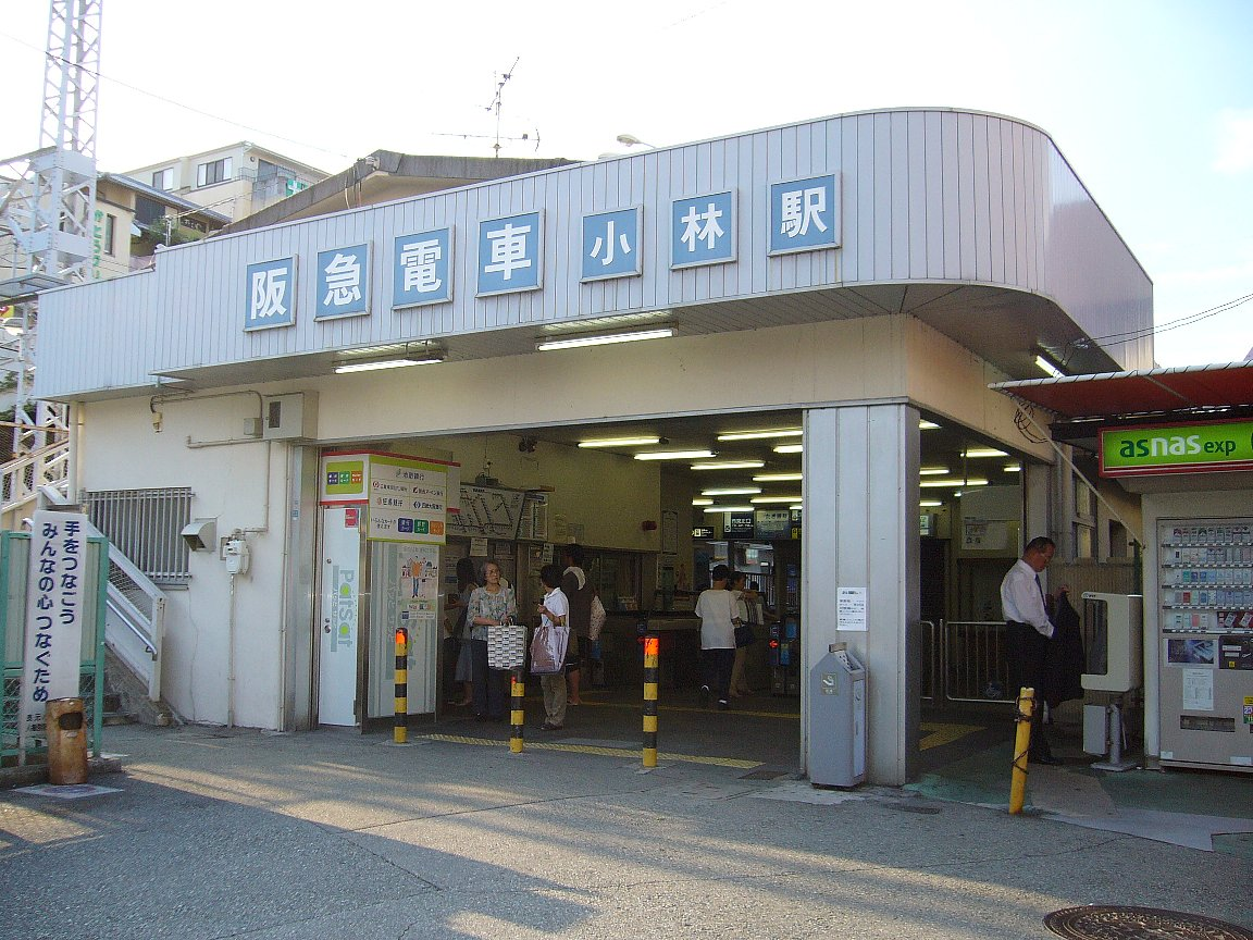 阪急今津線小林駅